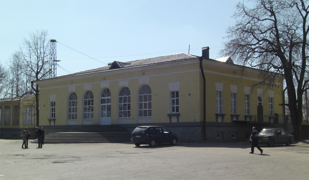 Балтийский вокзал в Гатчине